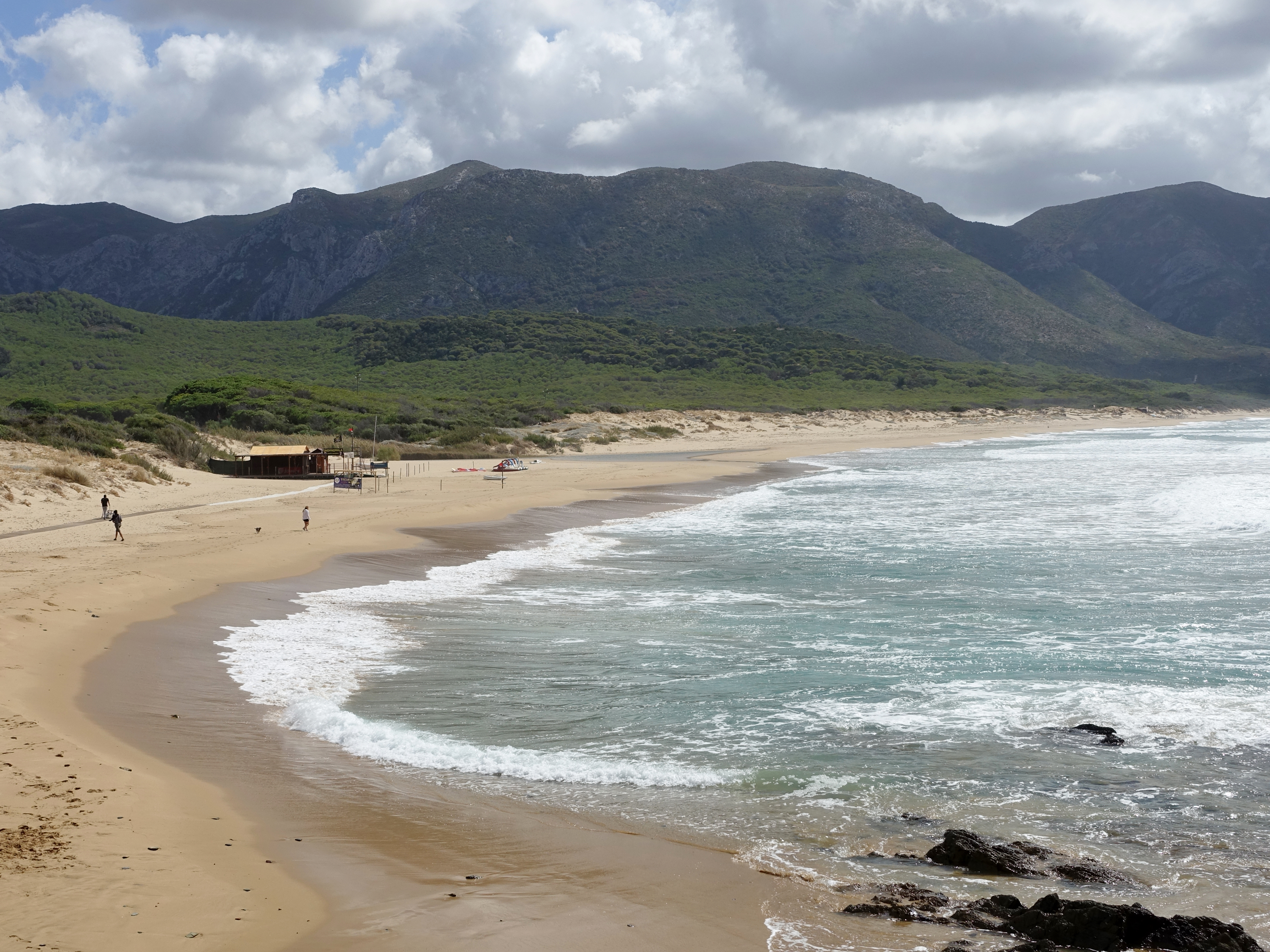 Strand Portixeddu (Spiaggia Portixeddu), Gemeinde Fluminimaggiore, Sardinien, Italien